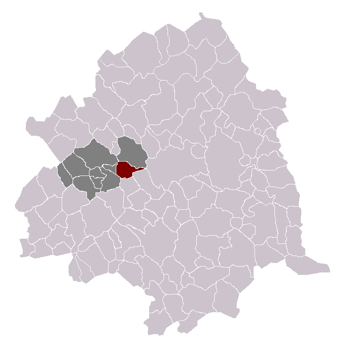 Sequedin dans son canton et son arrondissement